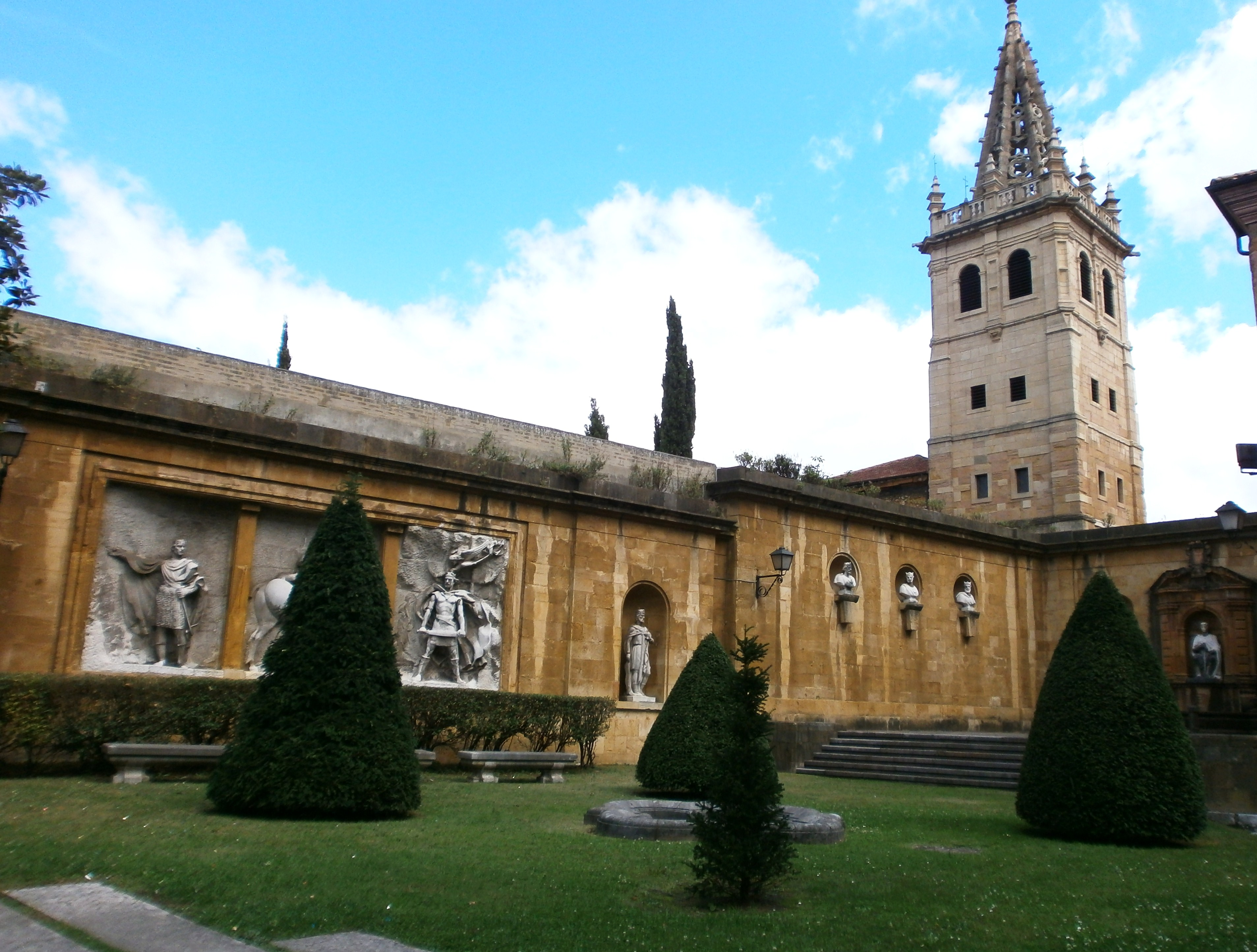 Catedral de San Salvador de Oviedo. Parque del rey Casto y las Pelayas al fondo